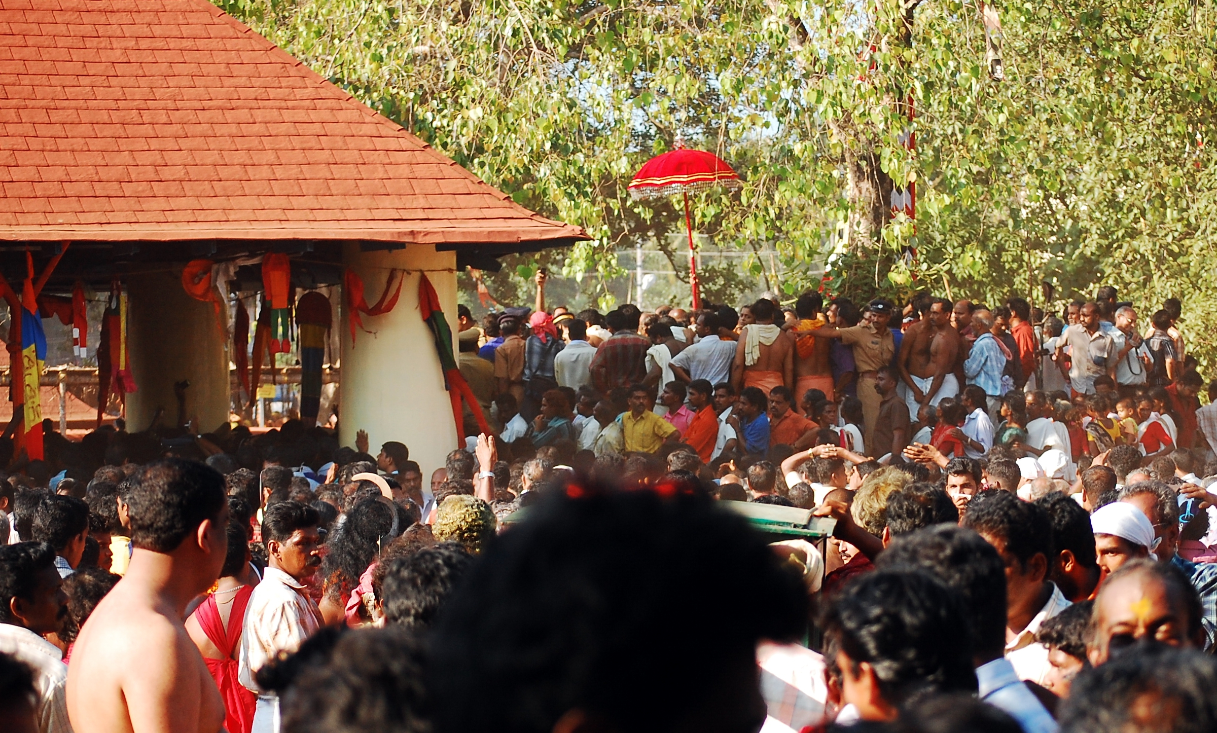 Kavutheendal flagoff